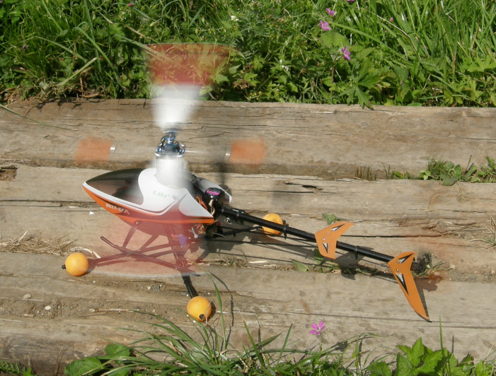 Радиоуправляемый вертолет Belt CPX на тренировочном шасси.